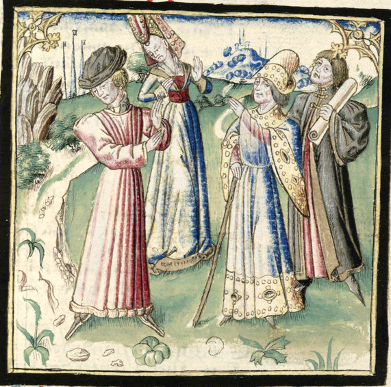 ChampionDesDames-Grenoble-Ms0352-f056 2r